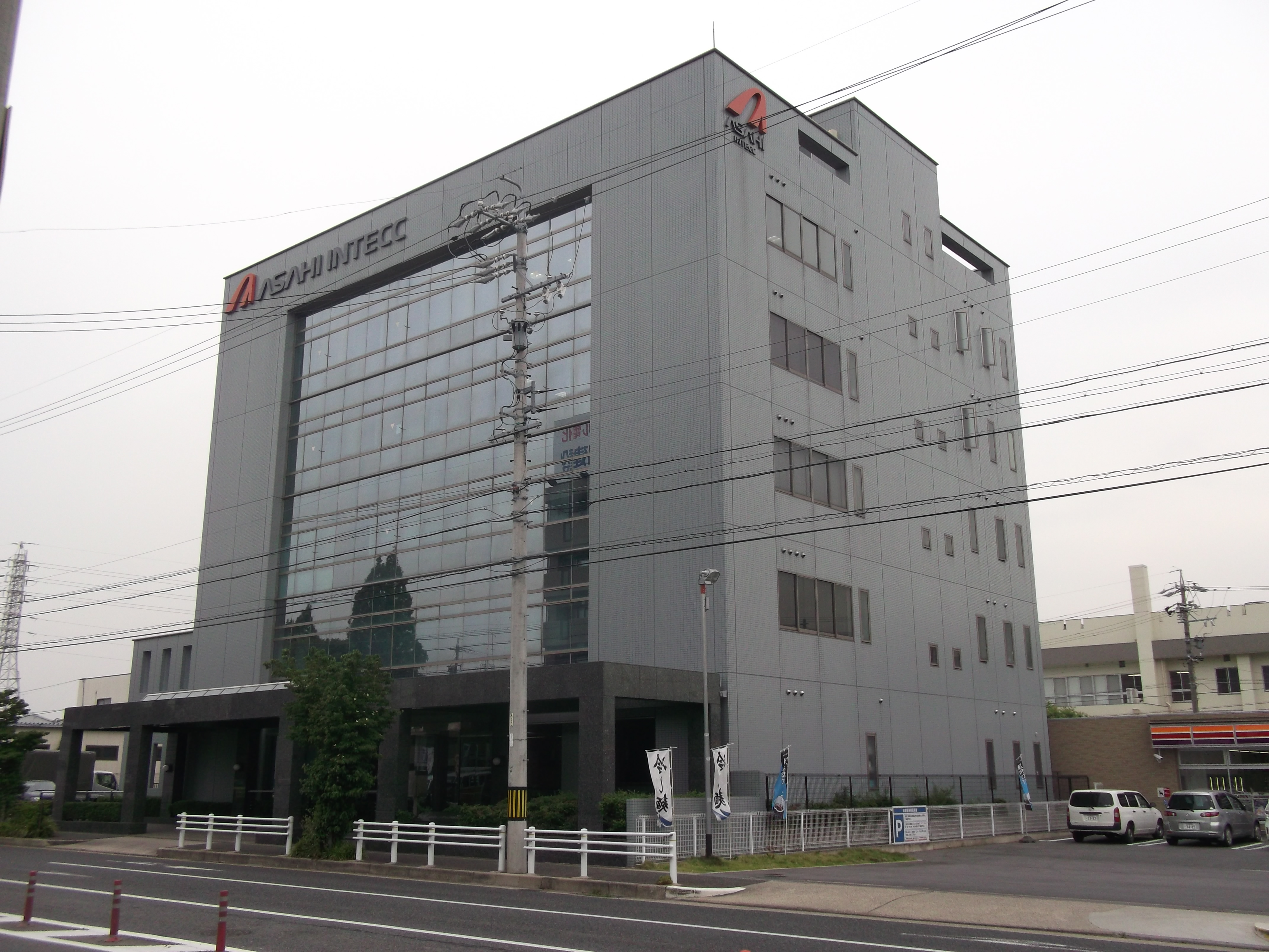 名古屋市守山区脇田町の朝日インテック本社ビルを北側公道西側より撮影